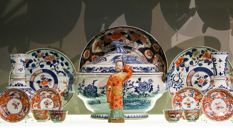 Hele kabinet Looxma Ypey Princessehof - Deel kabinet Looxma Ypey